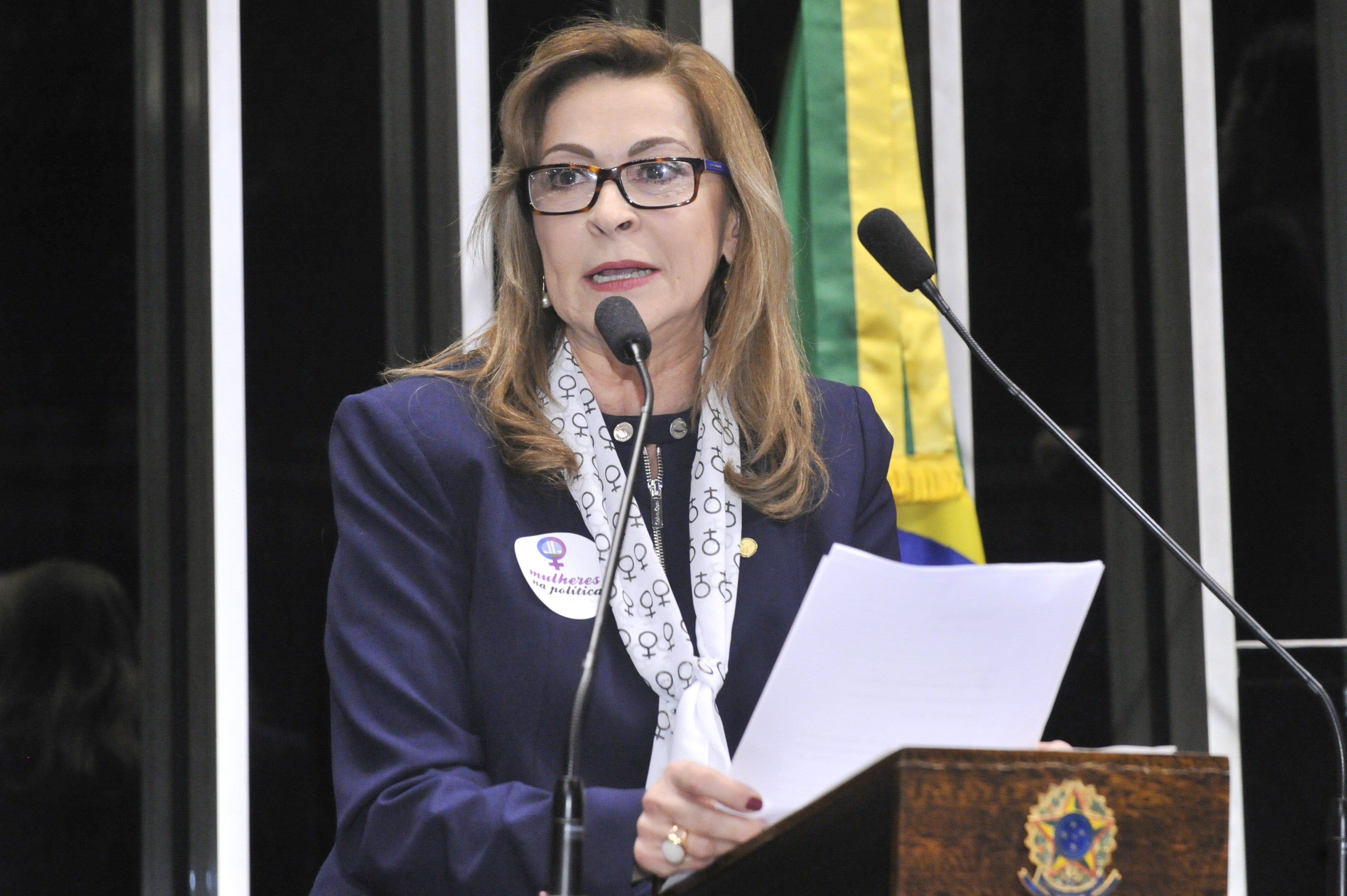 Plenário do Congresso Nacional durante sessão solene para homenagear a 5ª Marcha das Margaridas. A marcha faz parte da agenda do Movimento Sindical de Trabalhadores e Trabalhadoras Rurais, de movimentos feministas e de mulheres, que buscam erradicar todas as formas de discriminação e violência de gênero. O objetivo da sessão é chamar atenção da sociedade para as reivindicações de trabalhadores e trabalhadoras rurais no que se refere principalmente às questões de gênero no campo e na floresta. Em discurso, coordenadora-geral da Bancada Feminina na Câmara dos Deputados, deputada federal Dâmina Pereira (PMN-MG). Foto: Waldemir Barreto/Agência Senado